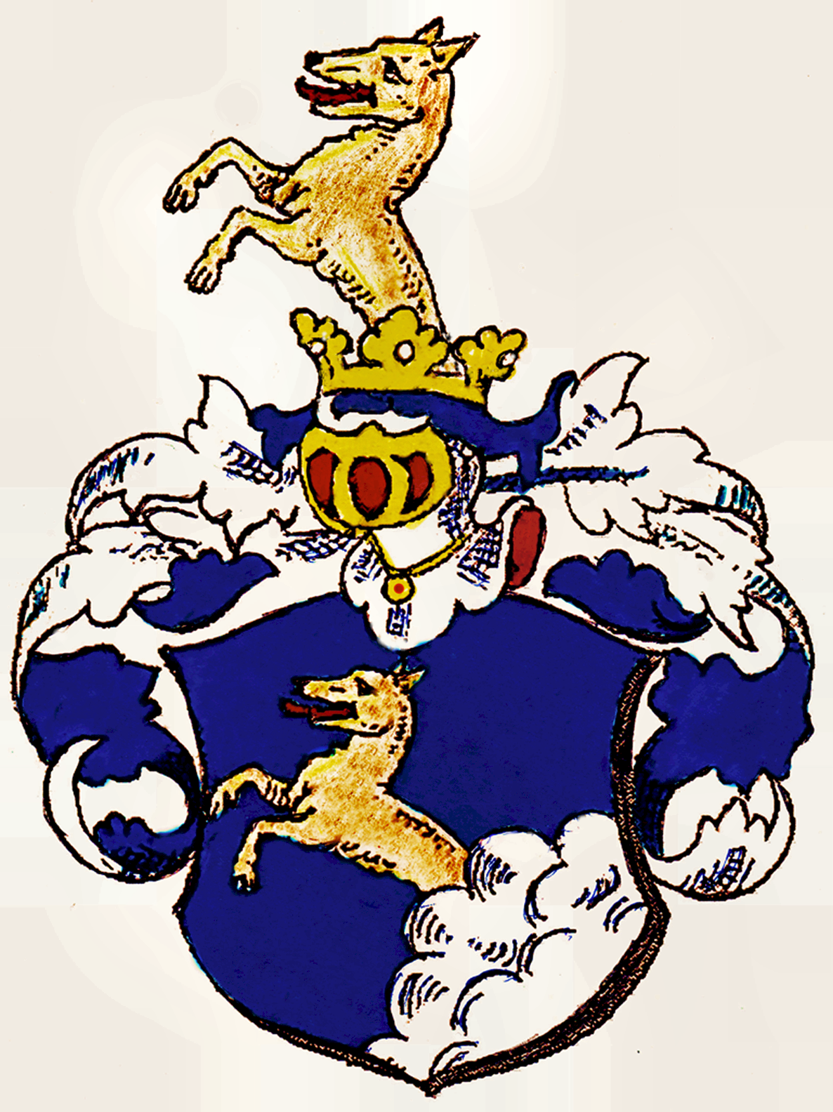 Wappen der Familie Schlechta von Wschehrd ohne Freiherrnkrone und Schildhalter